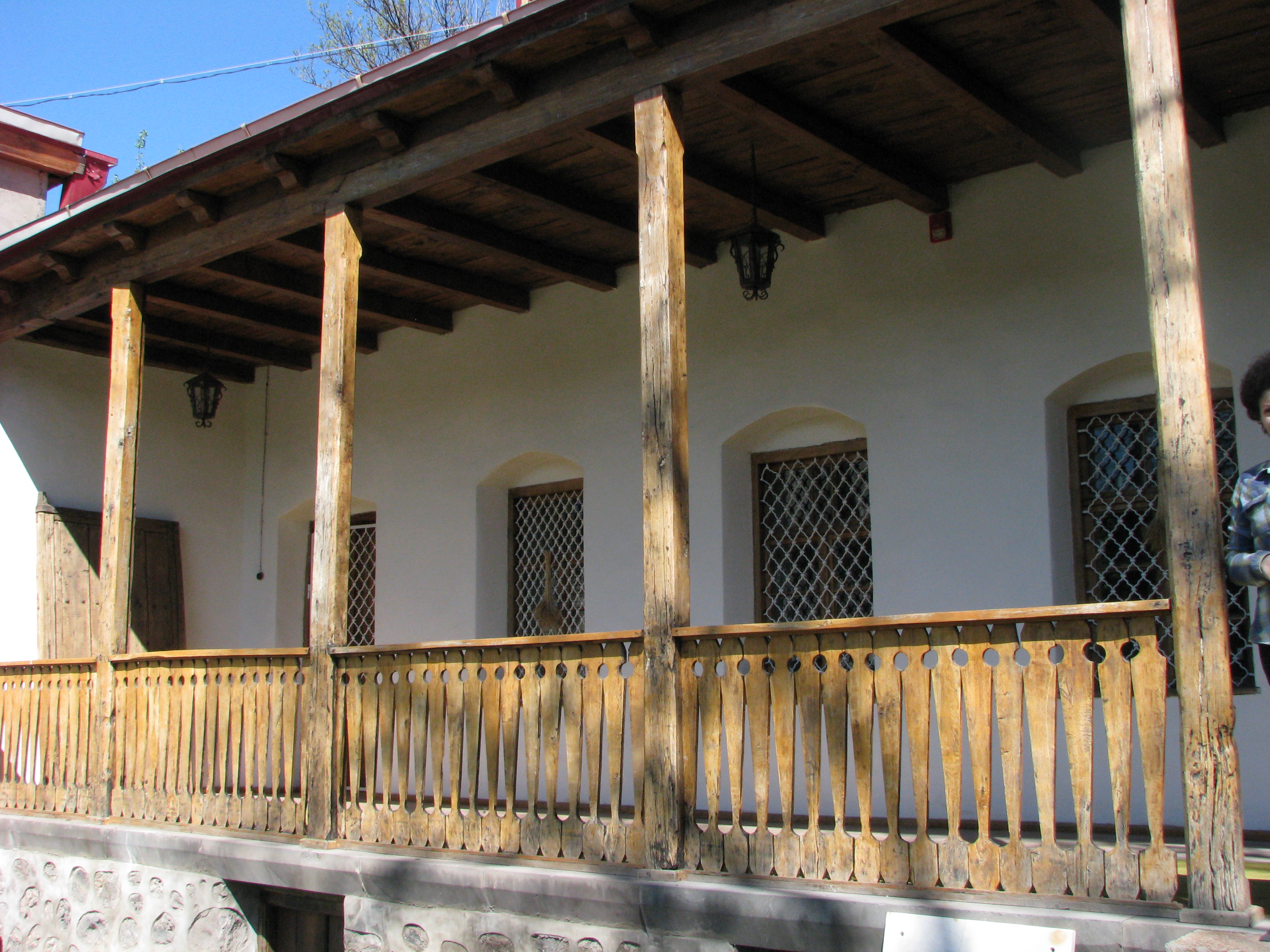 Ակսել Բակունցի տուն-թանգարան 3/156